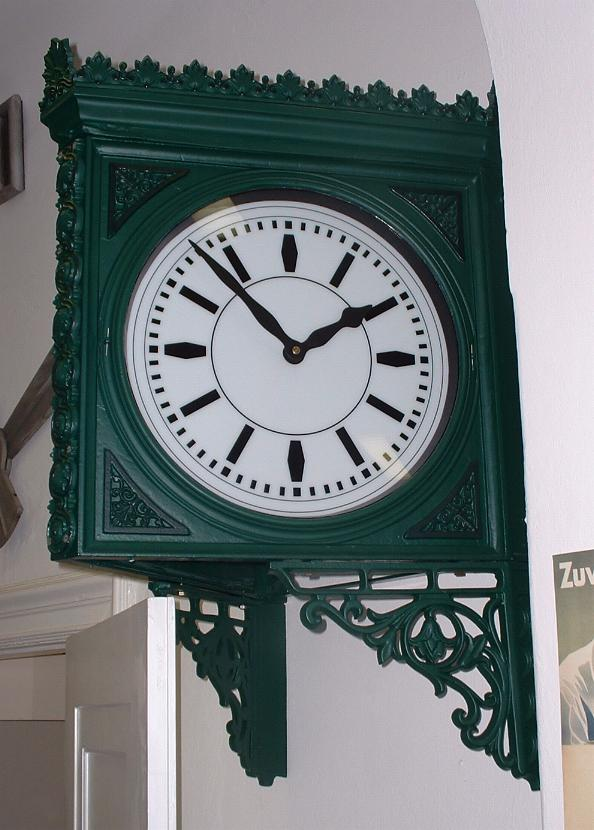 Nasenuhr Bauart KPEV